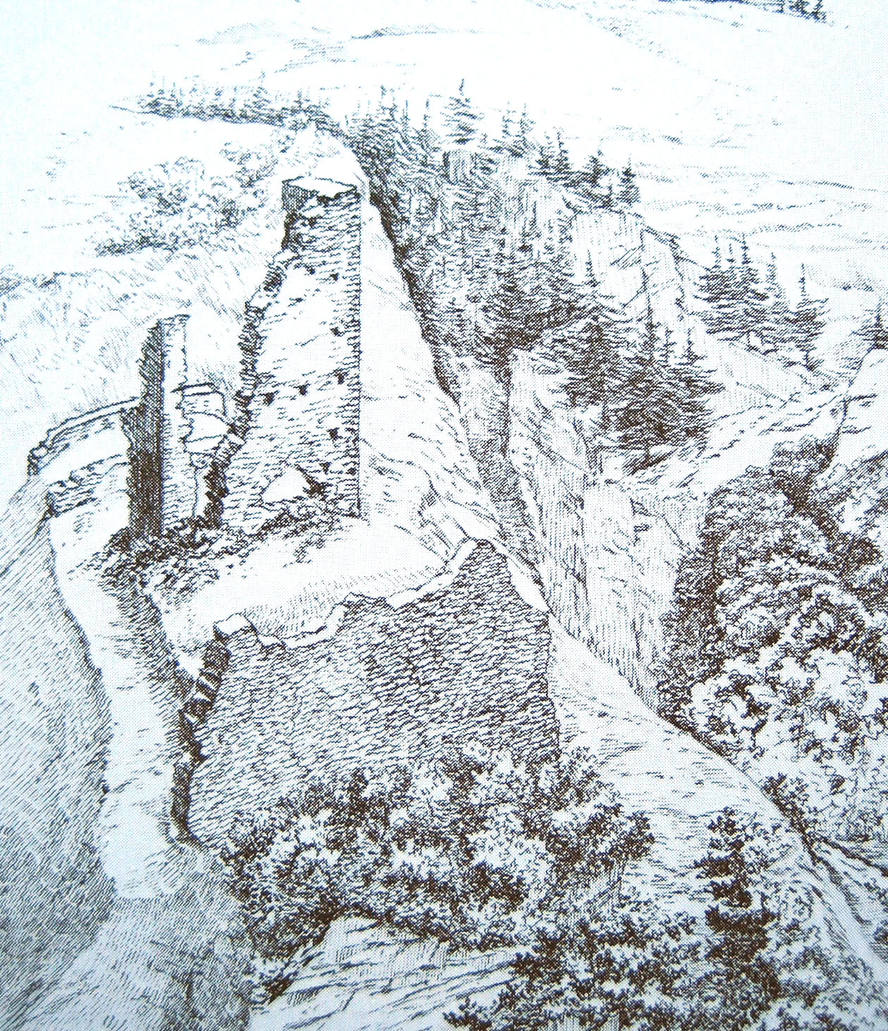 Zeichnung Moreggs nach Rahn, 1894